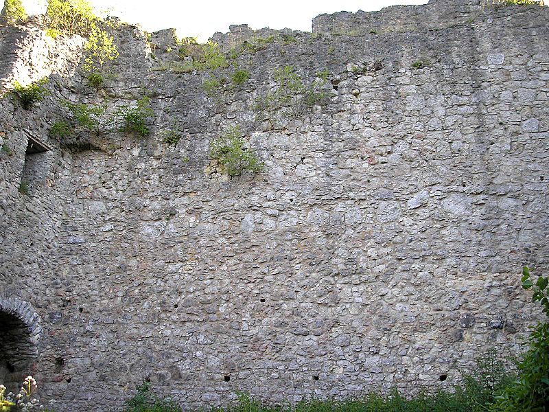 Burg Rumburg über Enkering (Landkreis Eichstätt, Oberbayern) / Rumburg Castle, Upper Bavaria, Germany. Innenseite der Frontmauer / Front wall from inside. Eigene Aufnahme, Juni 2006 / Own photo, June 2006